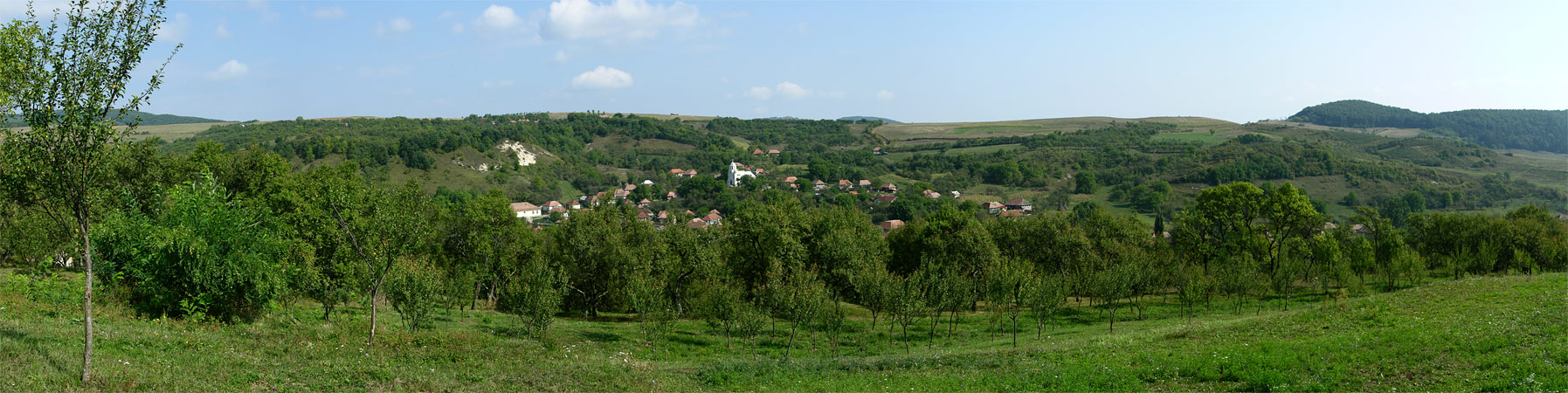 Panoramă a satului Stâna, Sălaj